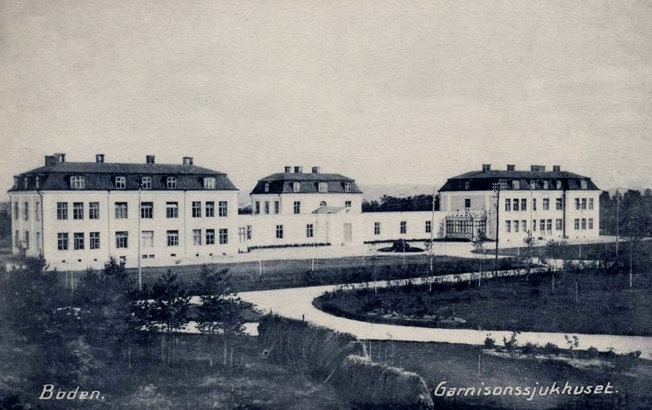 Garnisonssjukhuset i Boden, uppfört 1911, övertogs av landstinget 1957, och lades ner 2000.